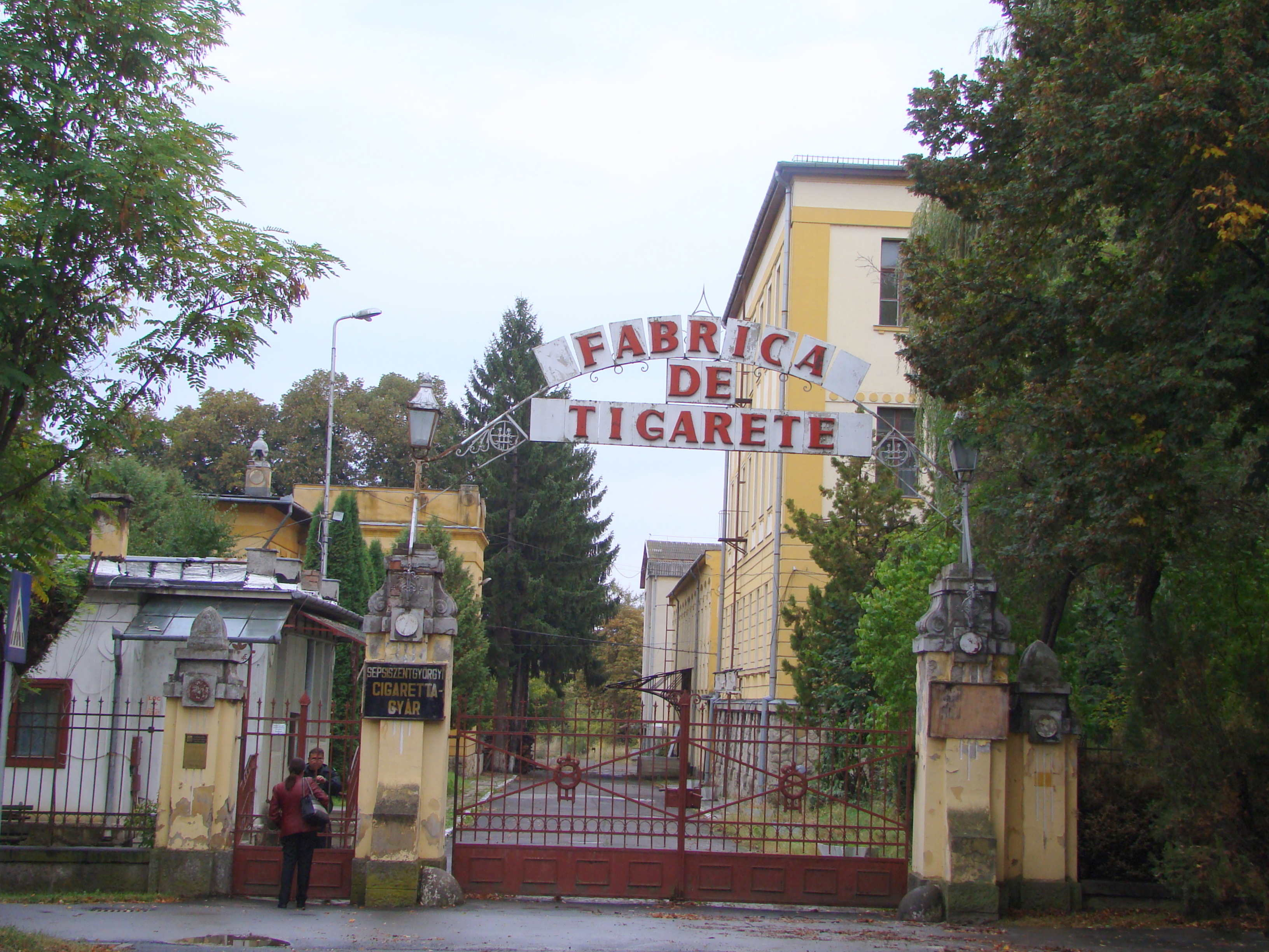 Ansamblul „Fabrica de Tutun”, municipiul Sfântu Gheorghe, str. Kós Károly 21-25 1902 - 1910